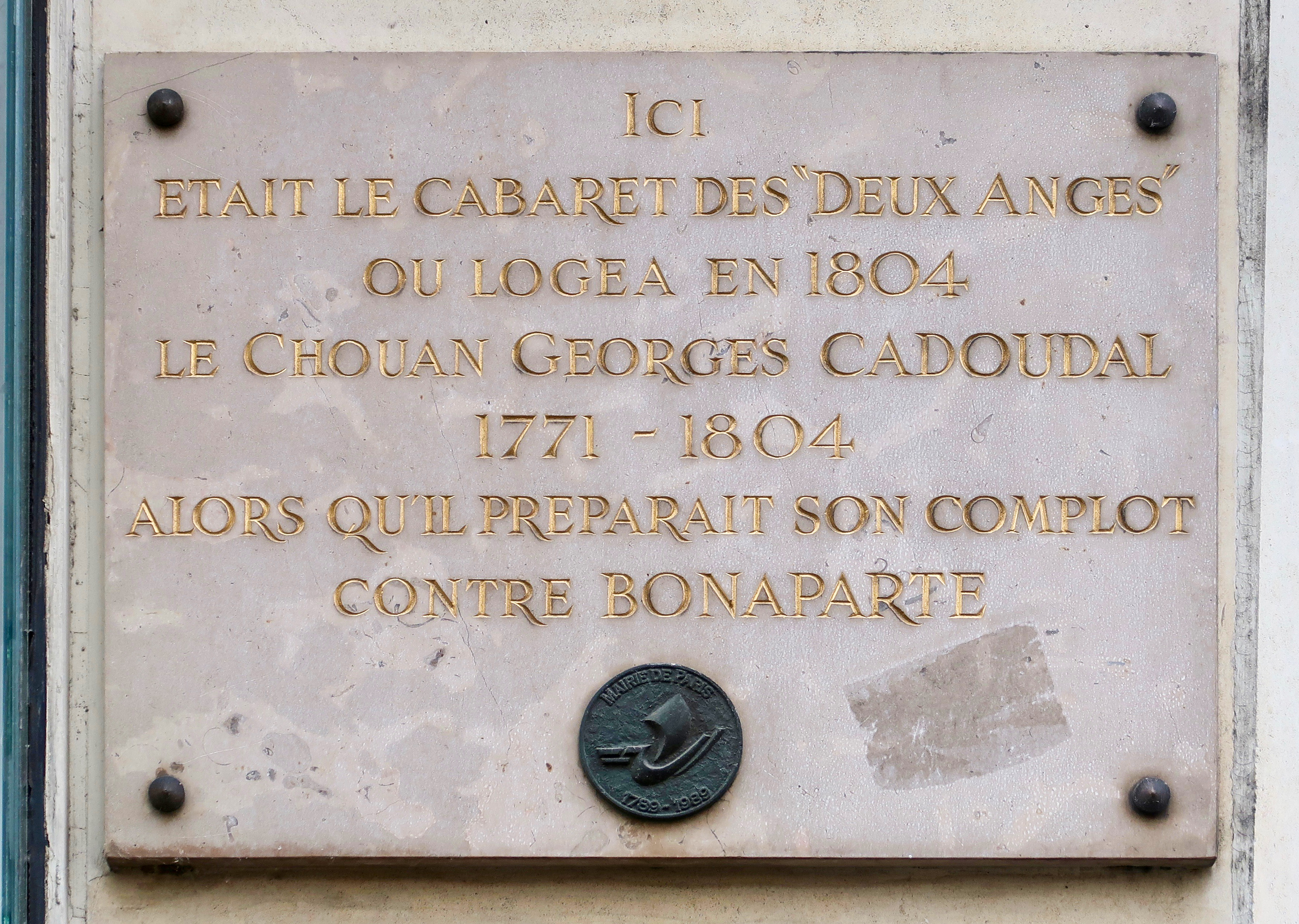 Plaque en mémoire du cabaret des Deux anges, 98 rue du Bac (Paris, 7e). Mention du général Cadoudal.